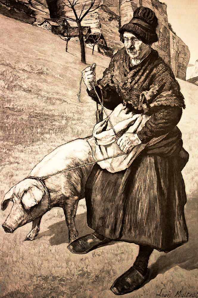 Caveuse d'Arcambal Lot, avec son cochon 1893